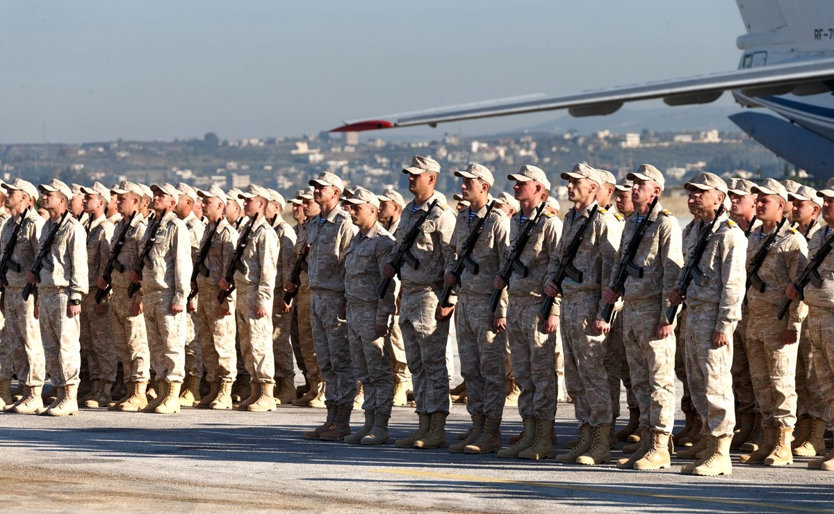 Во время посещения Президентом России Владимиром Путиным авиабазы Хмеймим в Сирии.